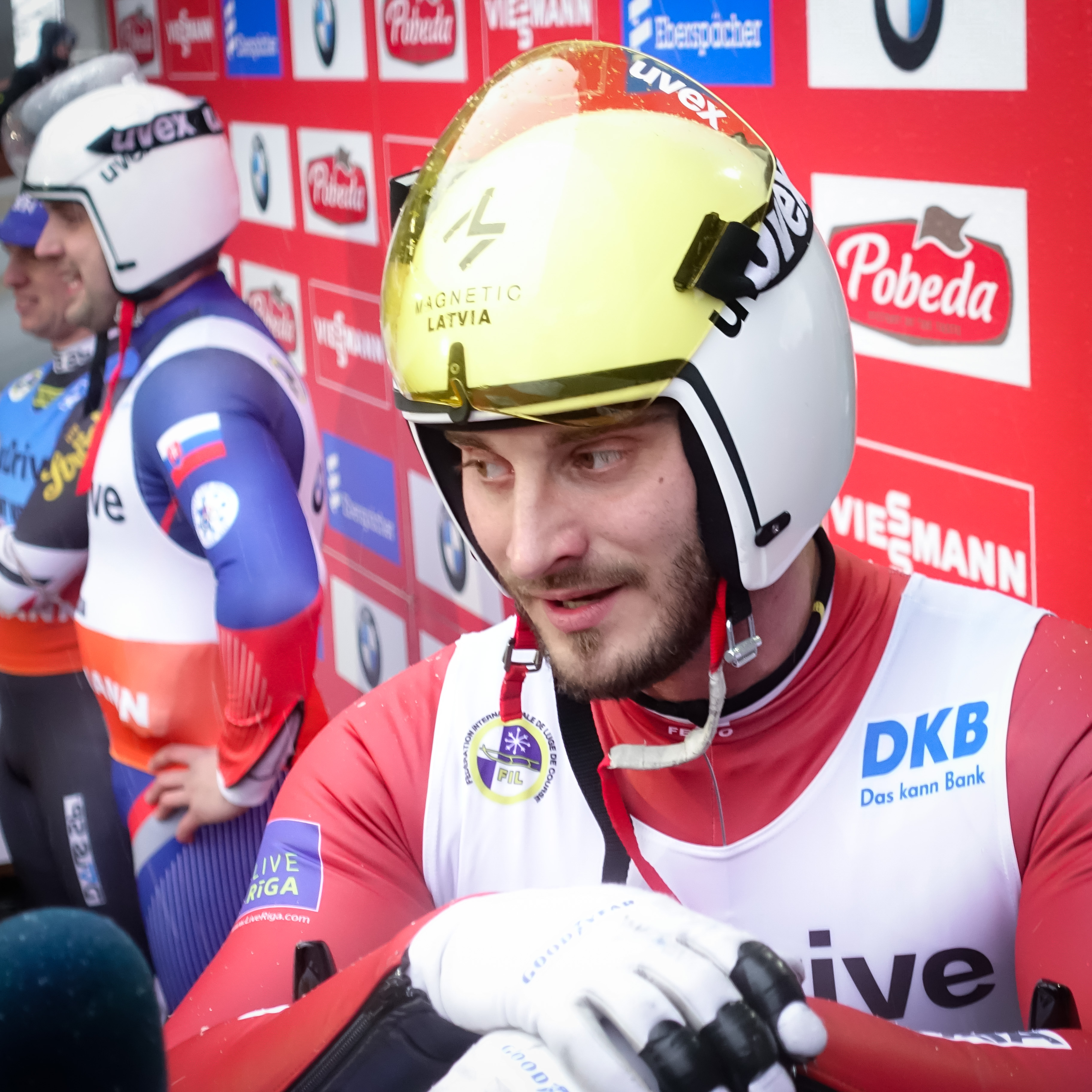 Latvijas kamaniņu braucējs Inārs Kivlenieks, pēc brauciena Siguldā, Nāciju kausa sacensībās 2018.gadā.